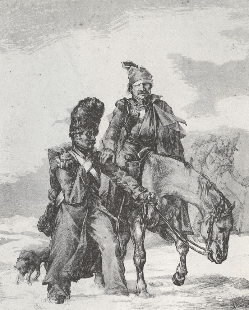 Rückkehr aus Russland (Lithographie)